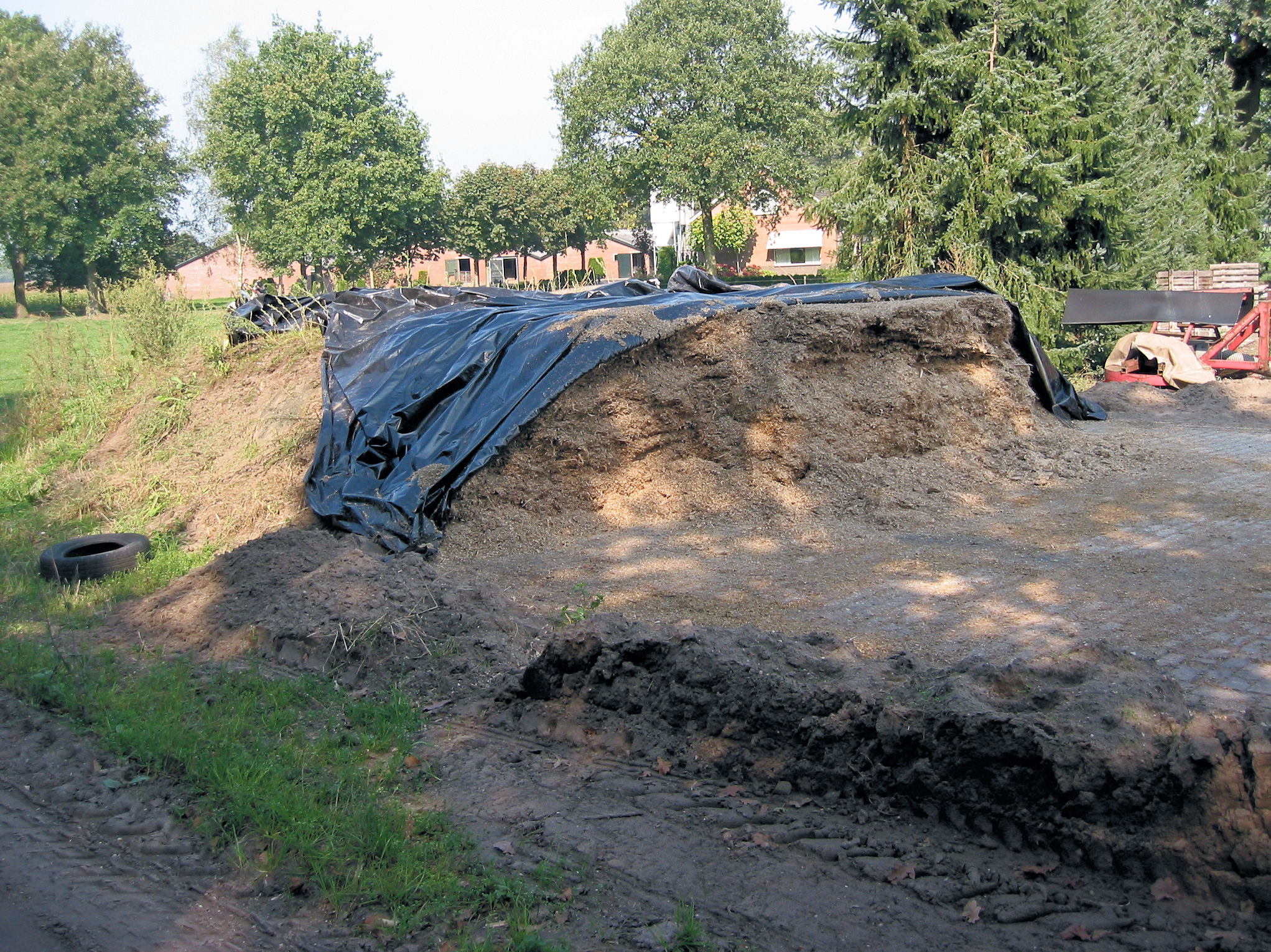 Maiskuil